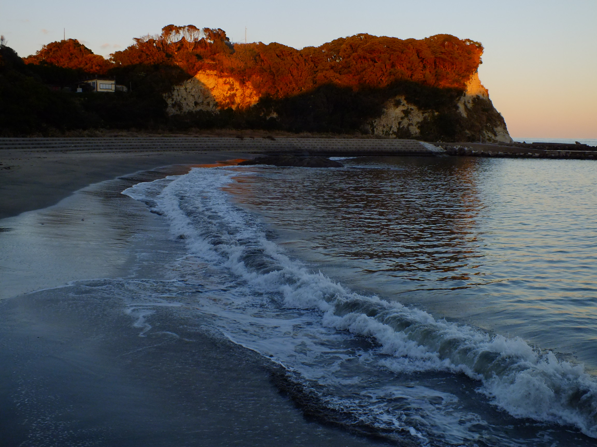 2013-11-30 Hachiman-Misaki Ohhara Isumi いすみ市大原八幡岬